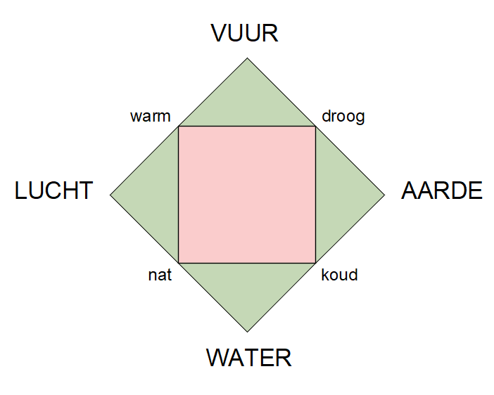 De vier elementen uit de Griekse filosofie